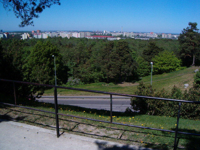 Nõmme vaateplatvorm vaatega Tallinna linnale